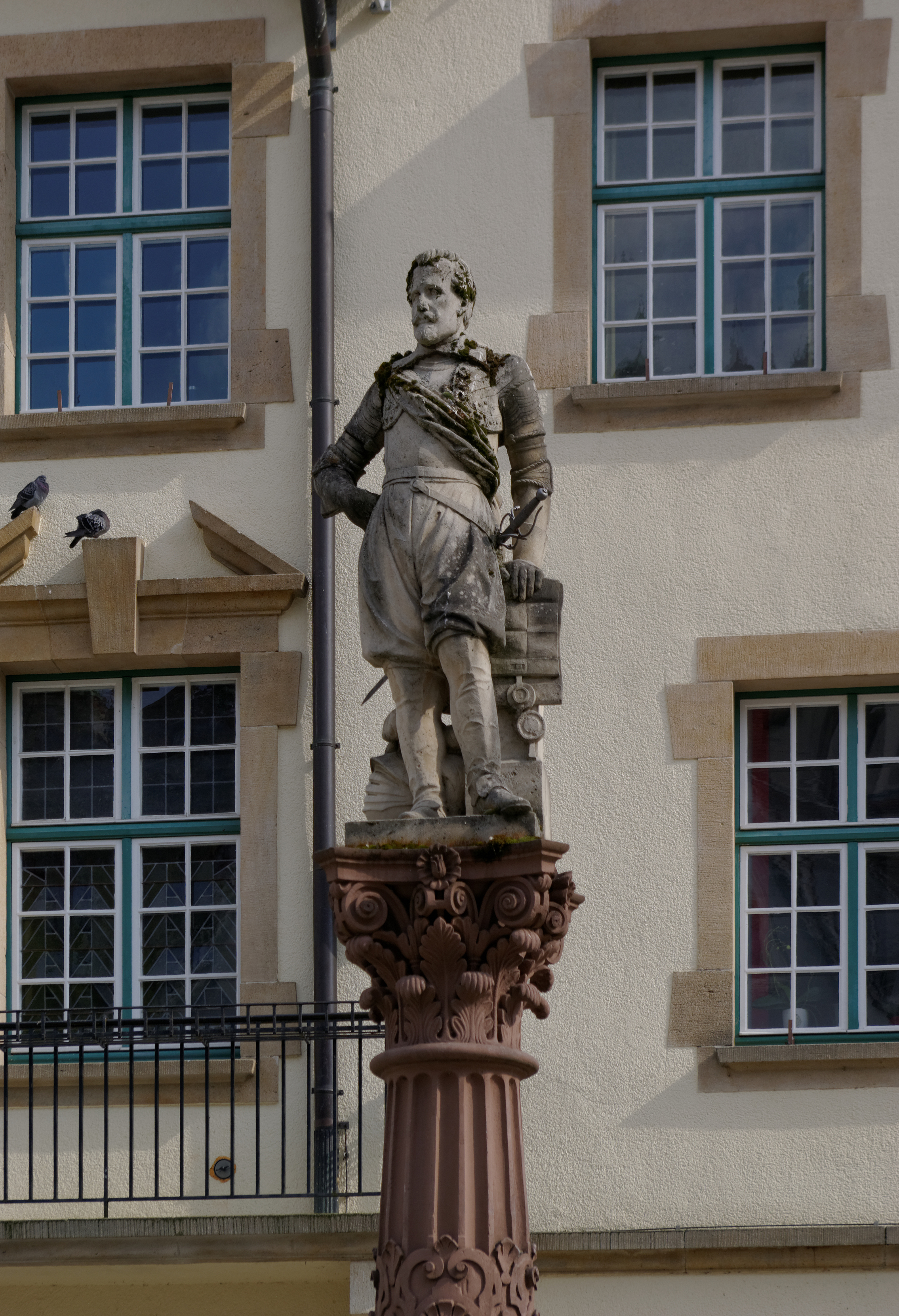 Sigmaringen, Marktbrunnen mit Statue Graf Johann von Hohenzollern-Sigmaringen